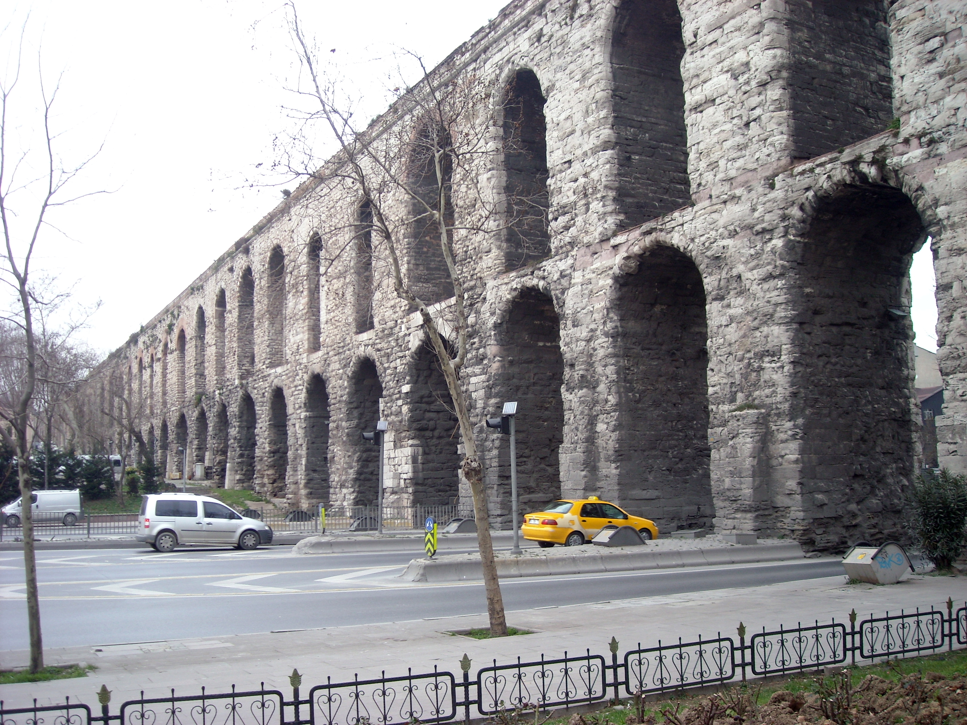 Valens Aqueduct